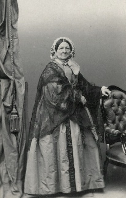 Мария Ивановна Васильева (1787-1870), урожденная Кутайсова